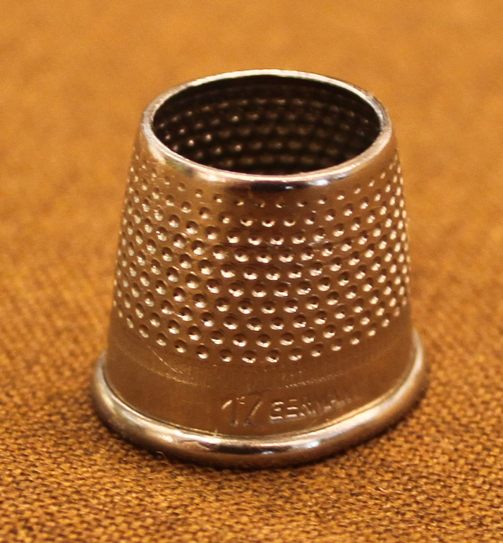 Nähring